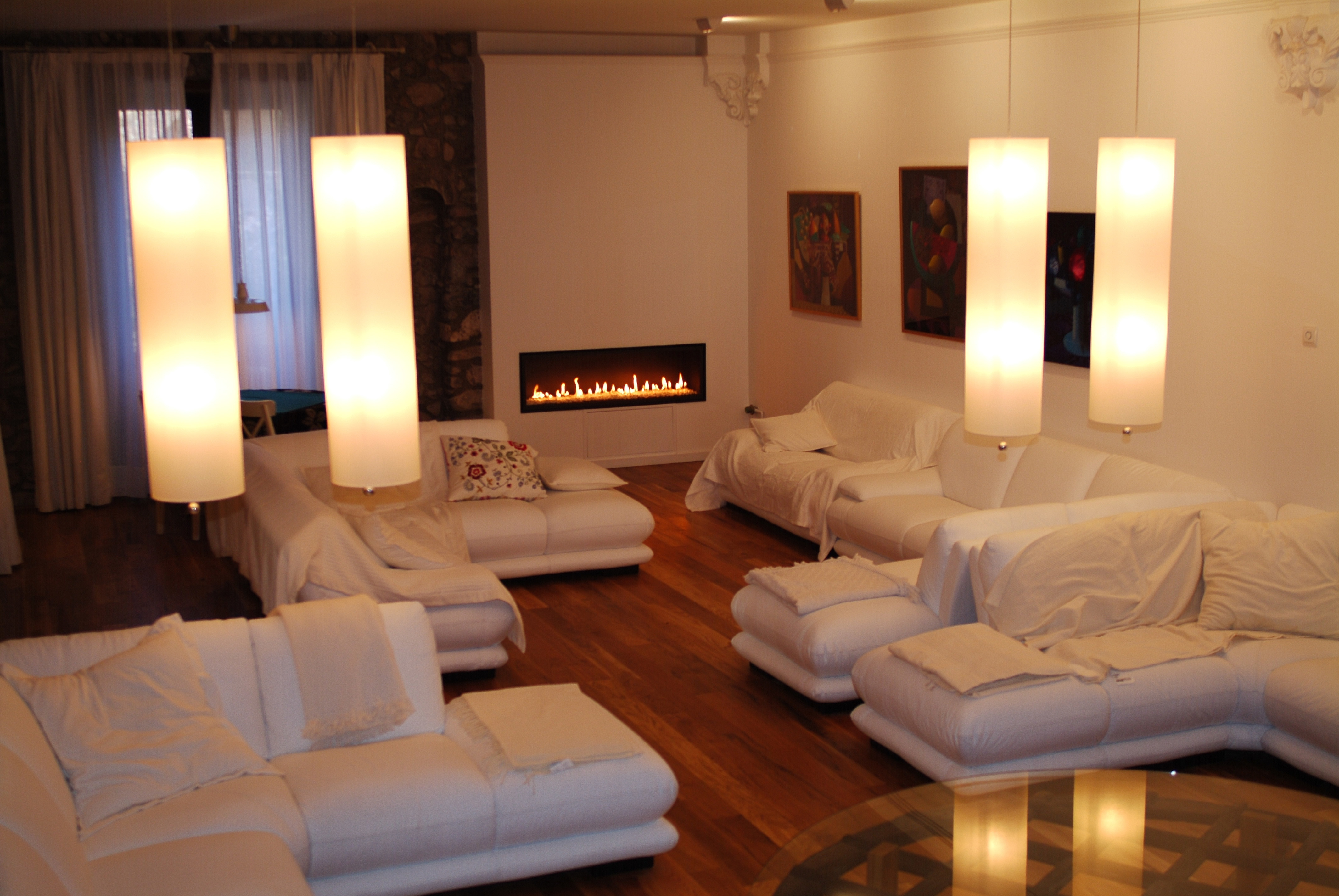 Sala de estar con chimena